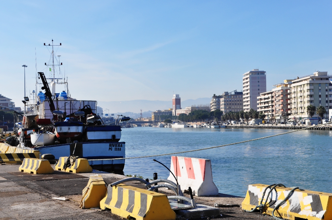 der Hafen von Pescara Dez 2013